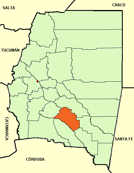 Mapa editado de: Santiago del Estero province (Argentina), departments and capital.png